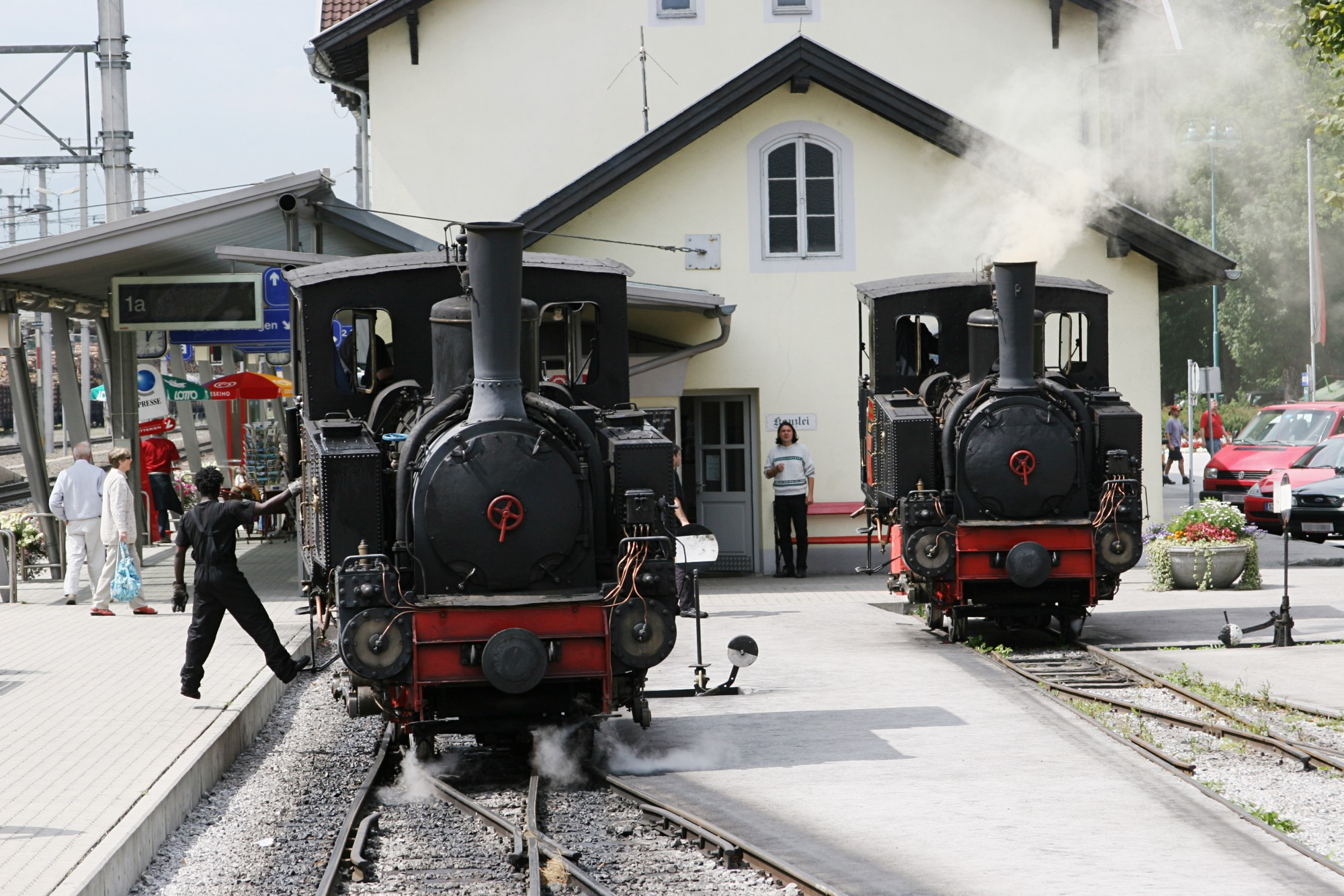 en: Two engines of the Achenseebahn shunting at Jenbach station de: Zwei Lokomotiven der Achenseebahn rangieren im Bahnhof Jenbach